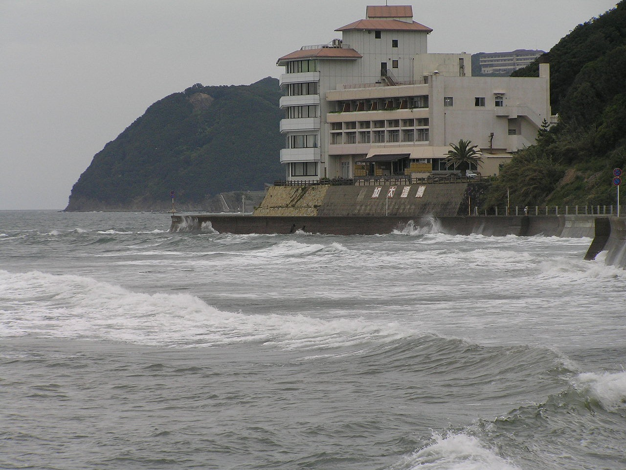 加太淡嶋温泉 紀淡海峡に面する